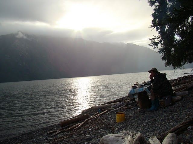 Вечер на берегу. Телецкое озеро